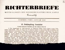 Deitsch: Richterbriefe Nr. 4, 1. Januar 1943 Titelseite